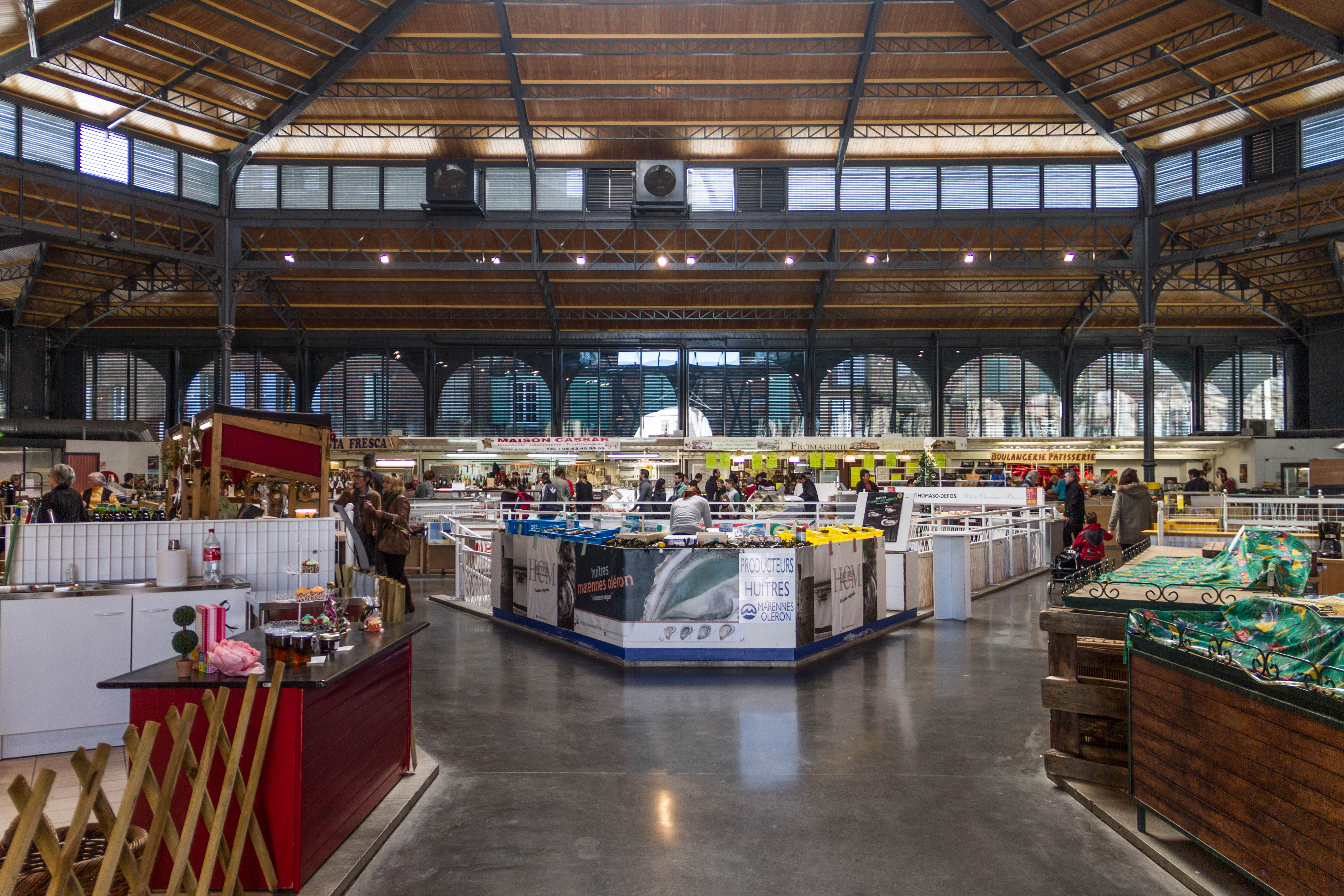 A l'intérieur du marché couvert d'Albi